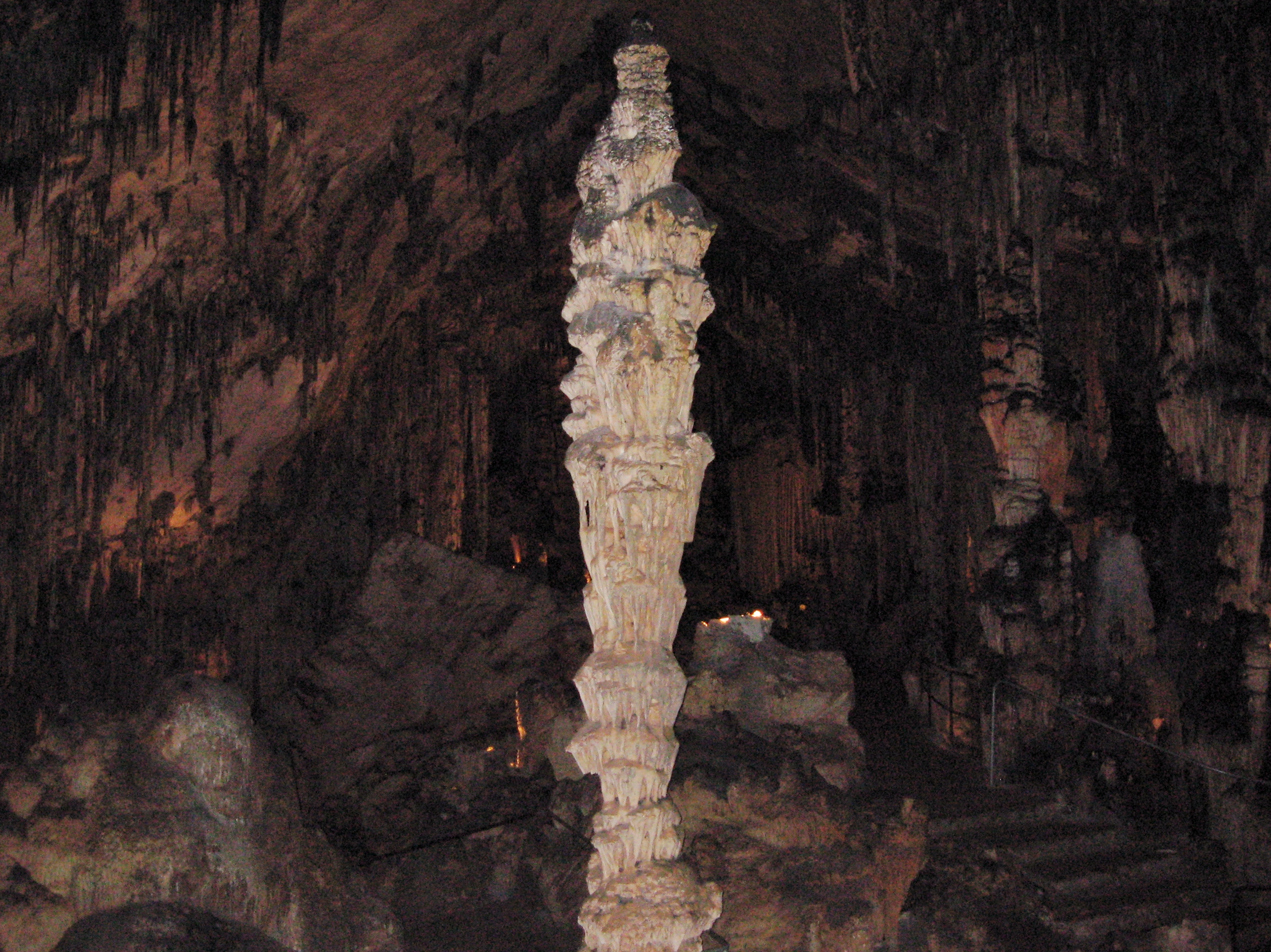 „Säulenkönigin“, Coves d’Artà, Gemeinde Capdepera, Mallorca, Spanien